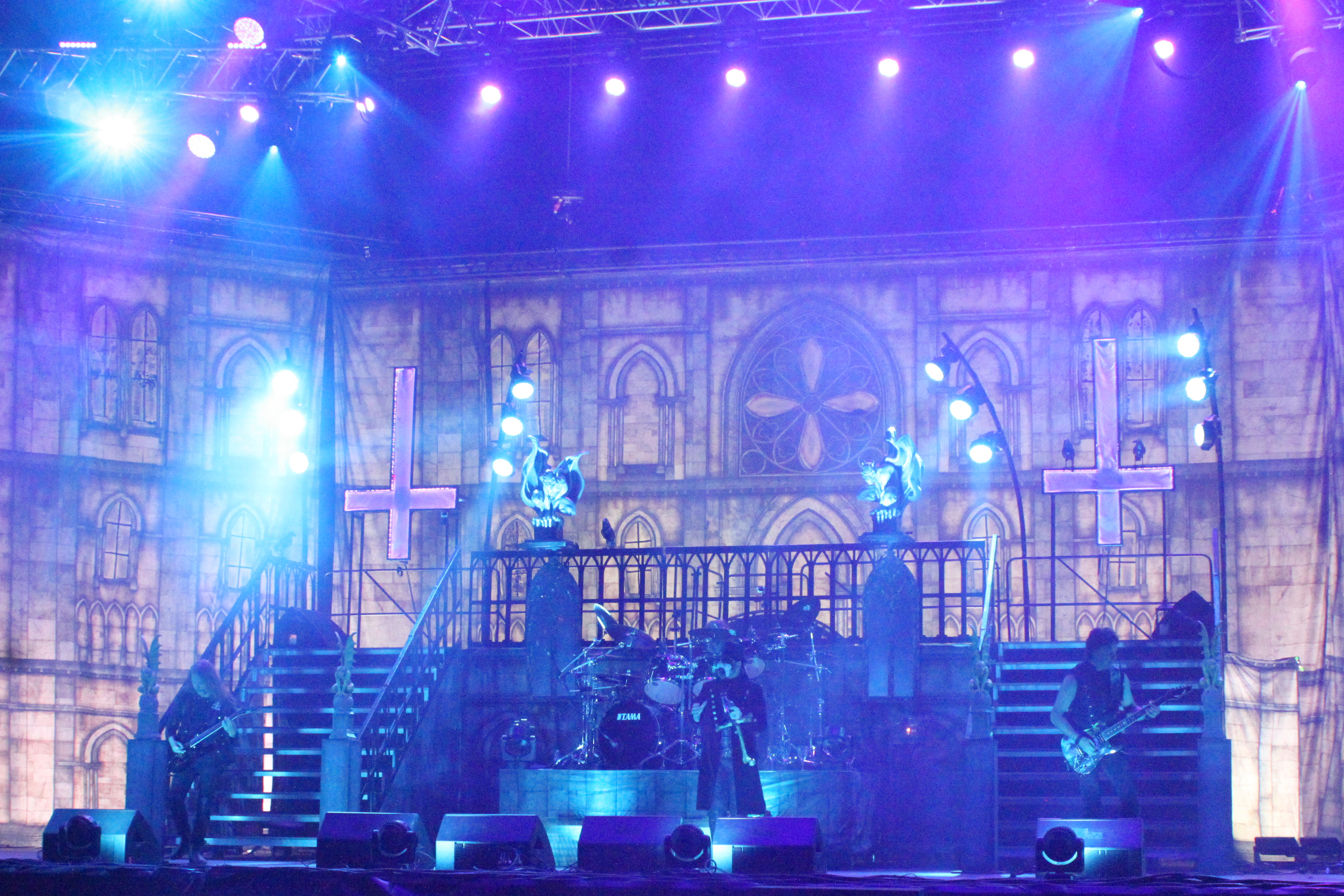 King Diamond, Hellfest 2016.